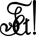 Zirkel der Unitas Stolzenfels